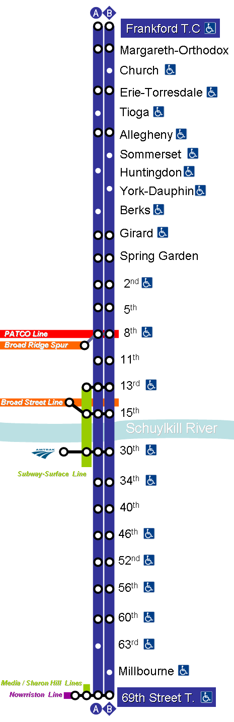 plan de la mfl